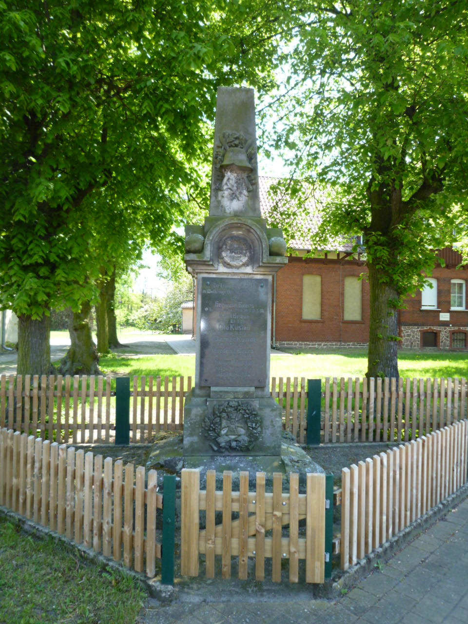 Calvörde-Berenbrock, Kriegerdenkmal im Mai 2012